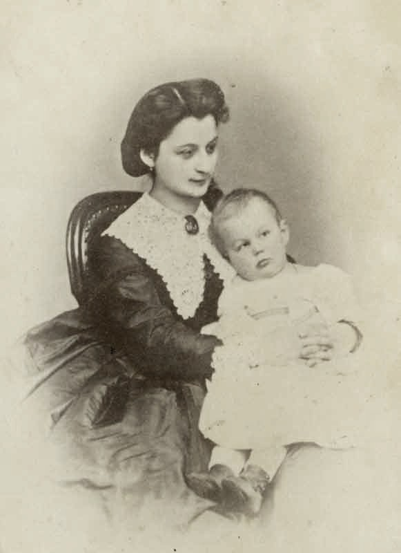 Варвара Силична Урусова, ур. Баташова (183. —1905) с сыном Сергеем.